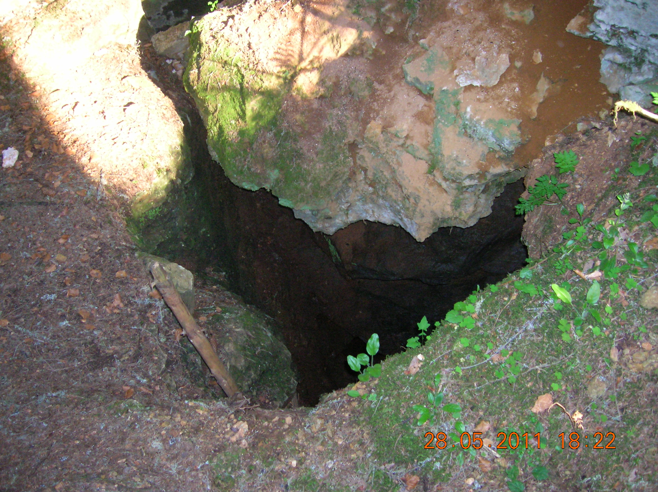 Jud. Harghita, Oraş Borsec, Rezervaţia Scaunul Rotund, Peştera de la Scaunul Rotund